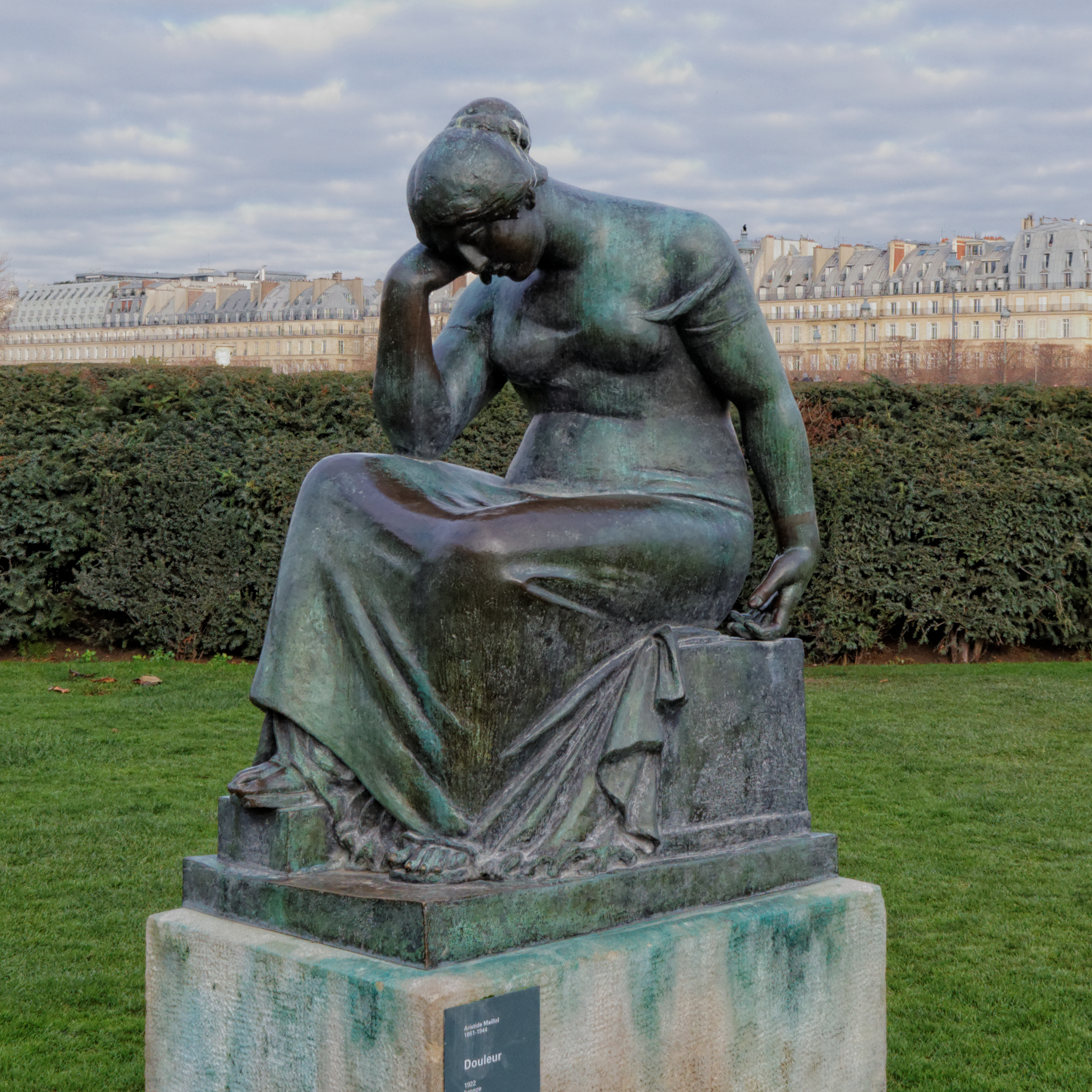 La Douleur (1922), statue d'Aristide Maillol installée dans le jardin du Carrousel à Paris.